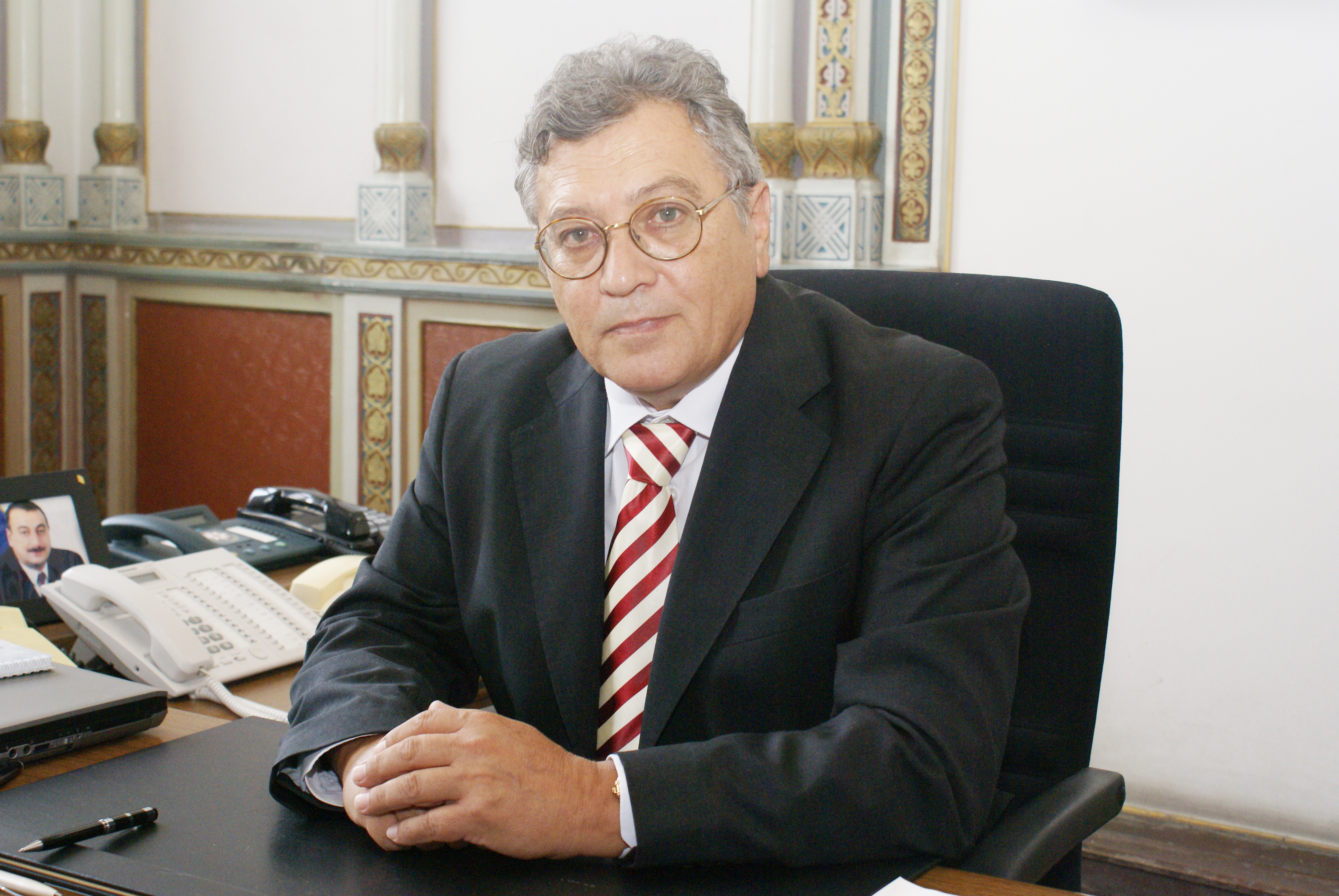 Mahmud Kərimov